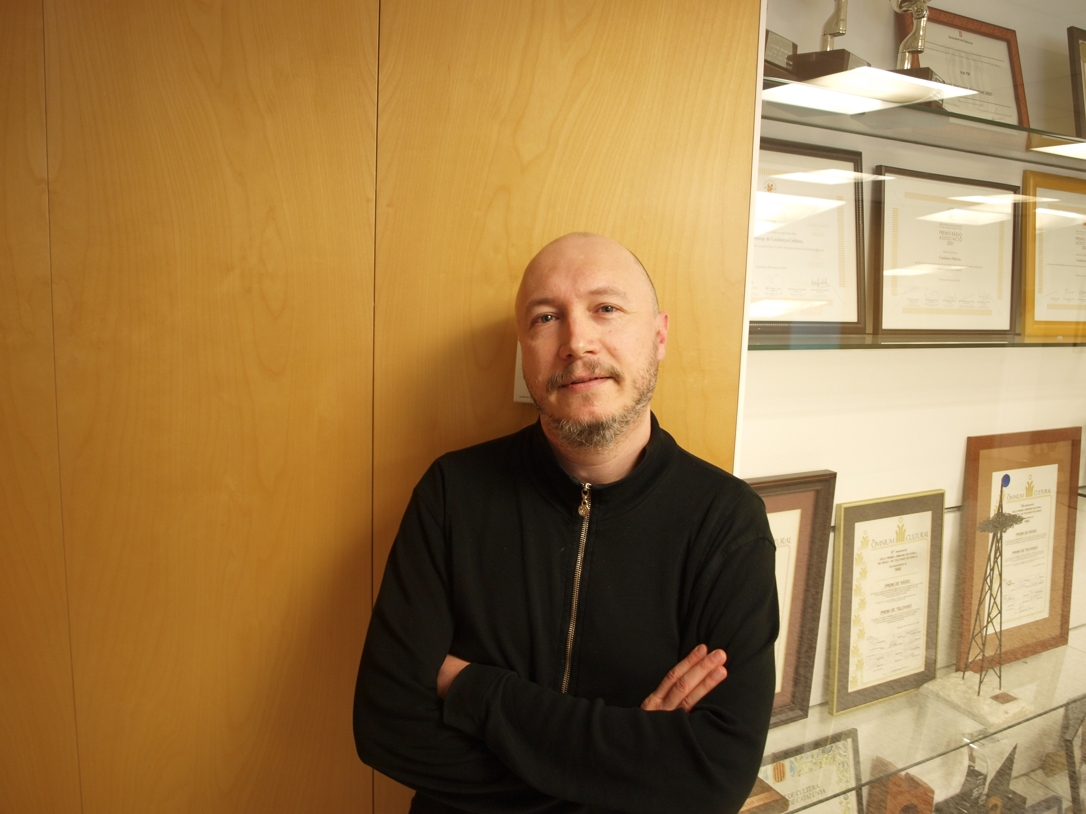 Xavier Bertran a seu de Catalunya Ràdio